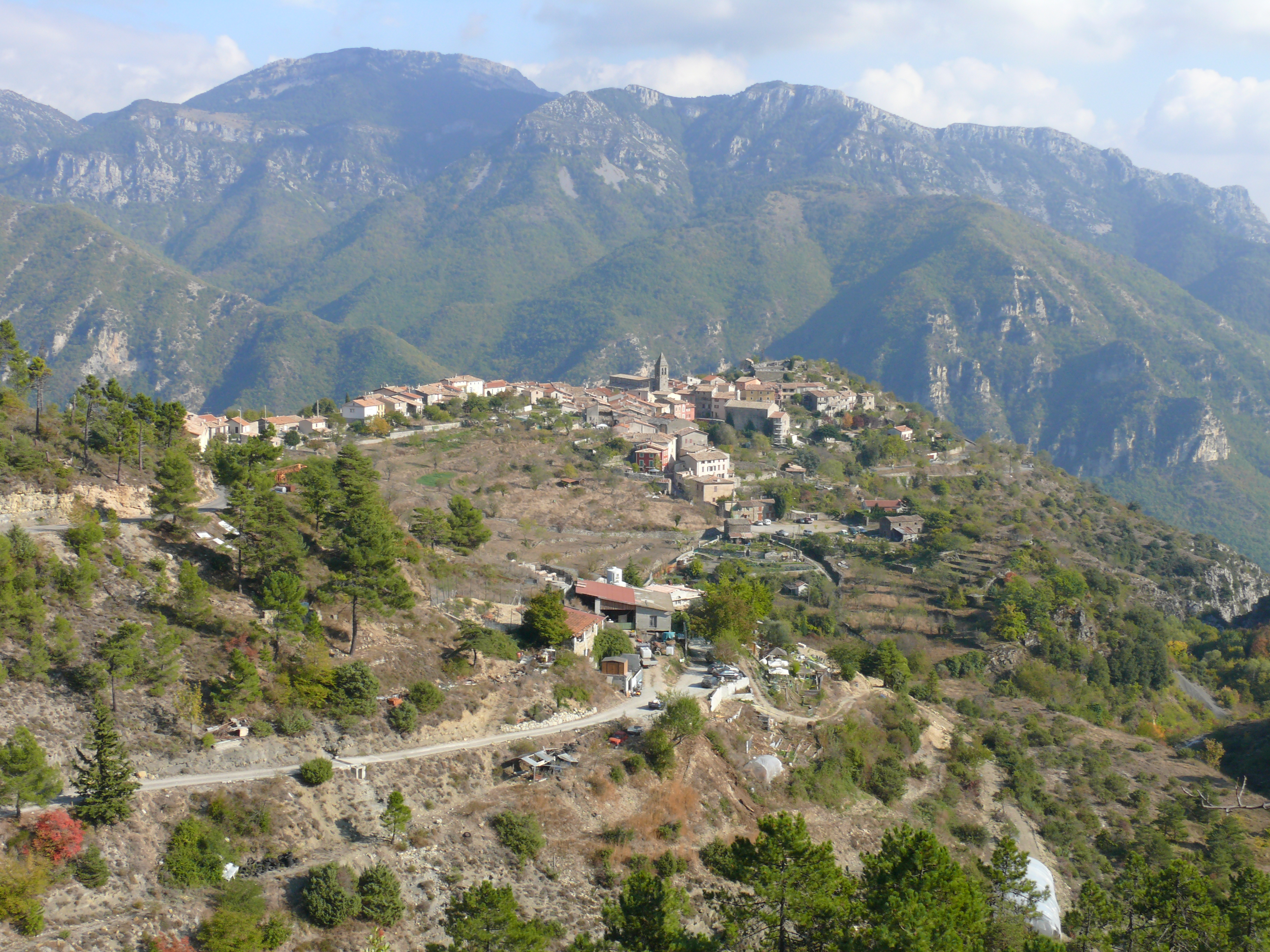 Utelle